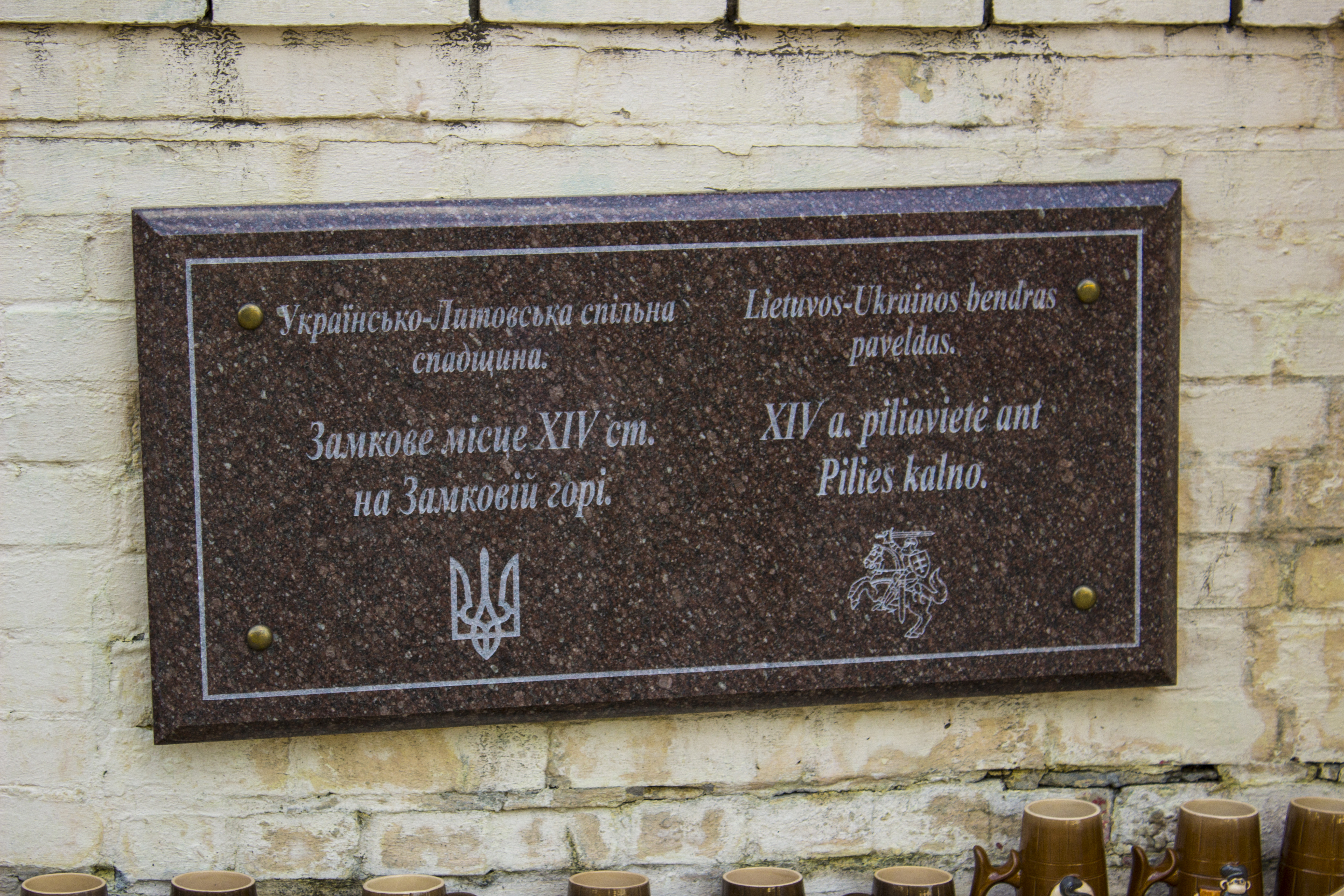 Замкова гора — Андріївський узвіз, Київ, Андріївський узвіз